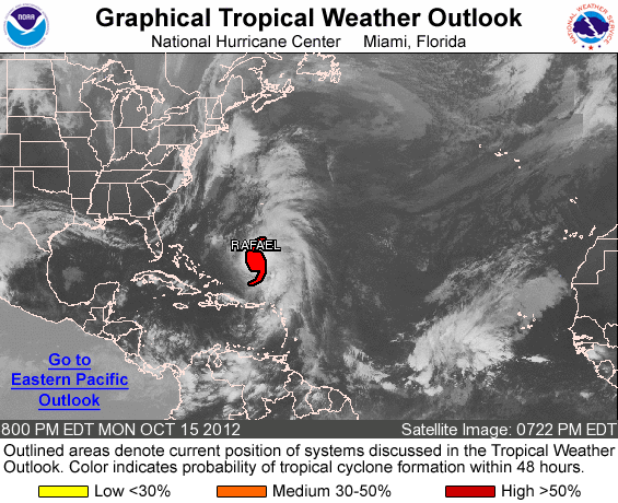 Imagen de la Tormenta tropical Rafael al transformarse en el Huracán Rafael (9° de la temporada) cuando sobrepasó las 85 millas por hora de velocidad de los vientos